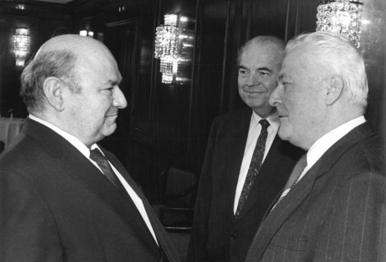 ADN-ZB Link-22.11.87-frs-BRD: Werner Felfe beim Bundesernährungsminister- Der Bundesernährungsminister Ignaz Kiechle (l.) empfing in München Werner Felfe (r.). Mitglied des Politbüos und Sekretär des ZK der SED. 2.v.r. der Leiter der Ständigen Vertretung der DDR in der BRD, Botschafter Ewald Moldt.